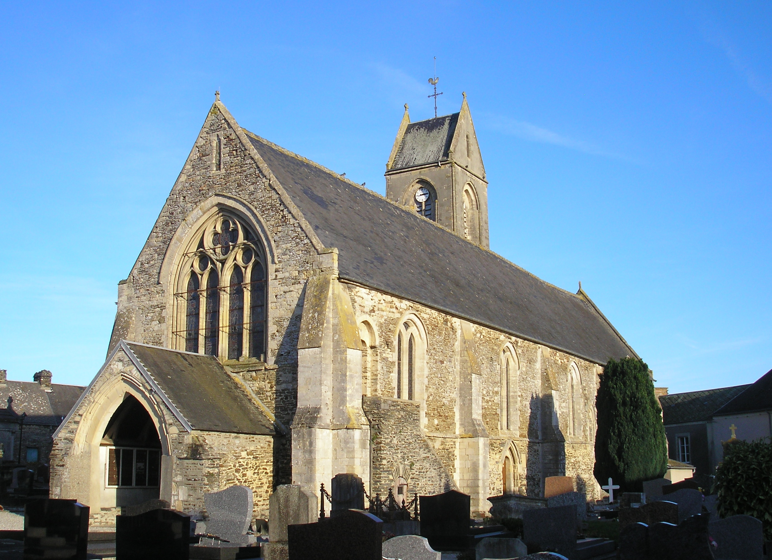 Cormolain (Normandie, France). L'église Saint-André.